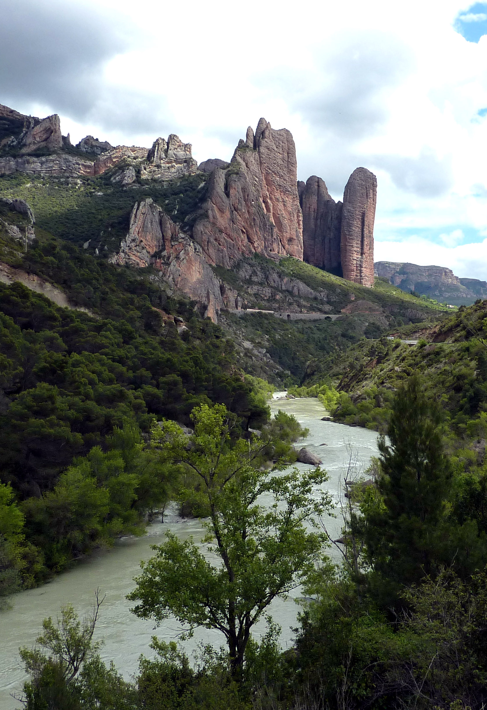 Los Mallos de Riglos - Monster Monoliths